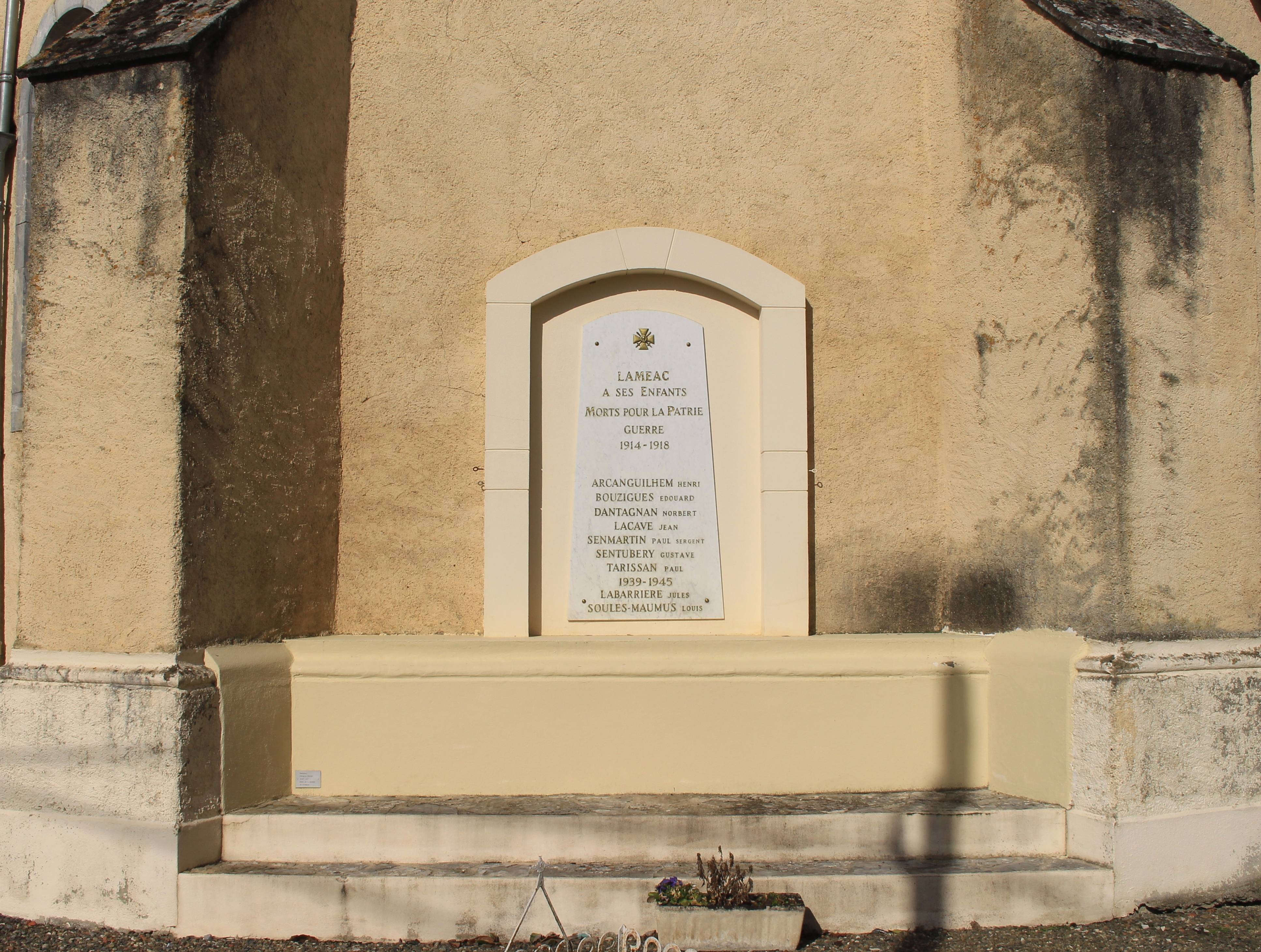 Monument aux morts de Laméac (Hautes-Pyrénées)